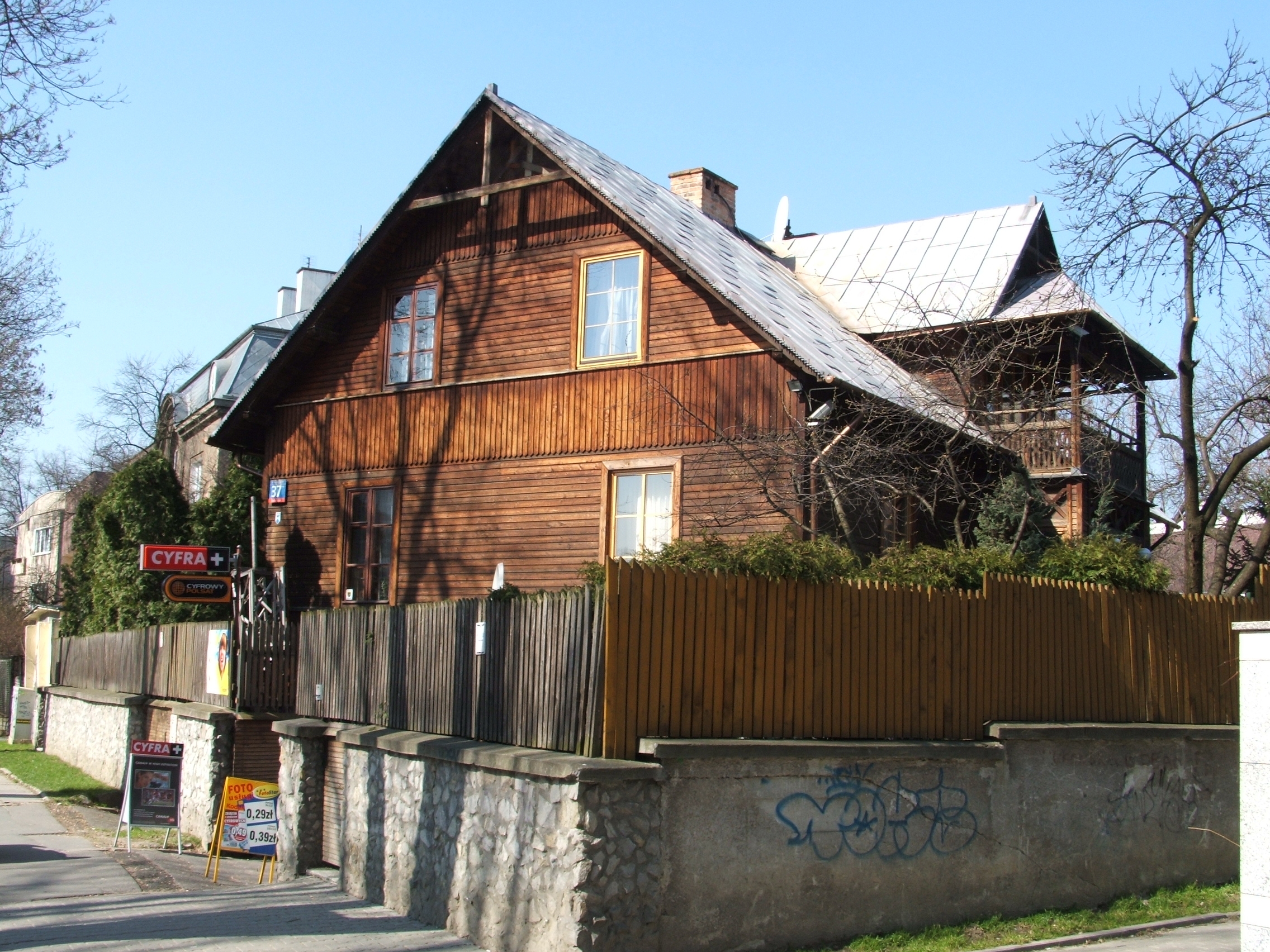 Najstarszy dom Saskiej Kępy - ul. Walecznych 37